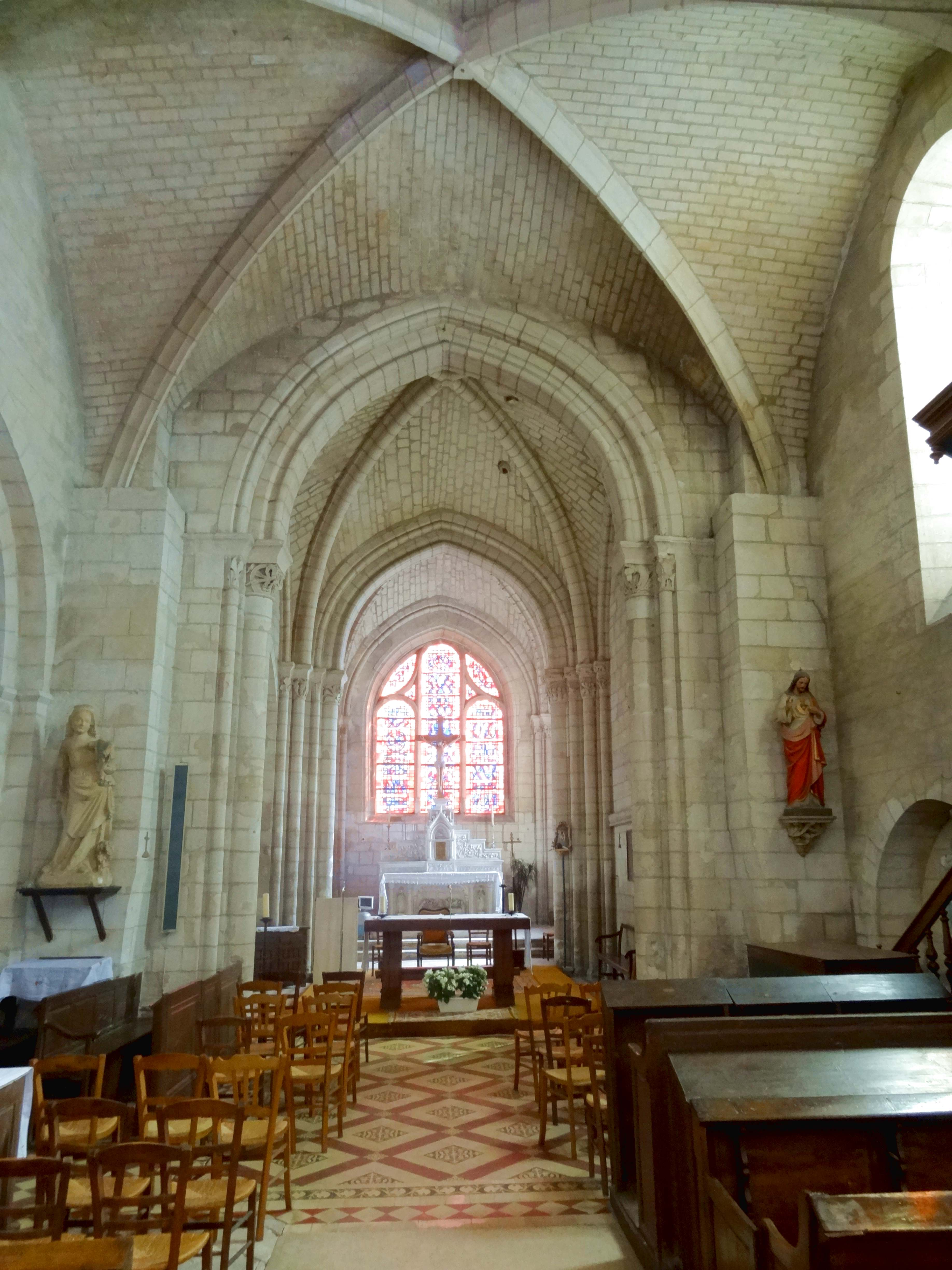 Intérieur de l'église - voir titre.